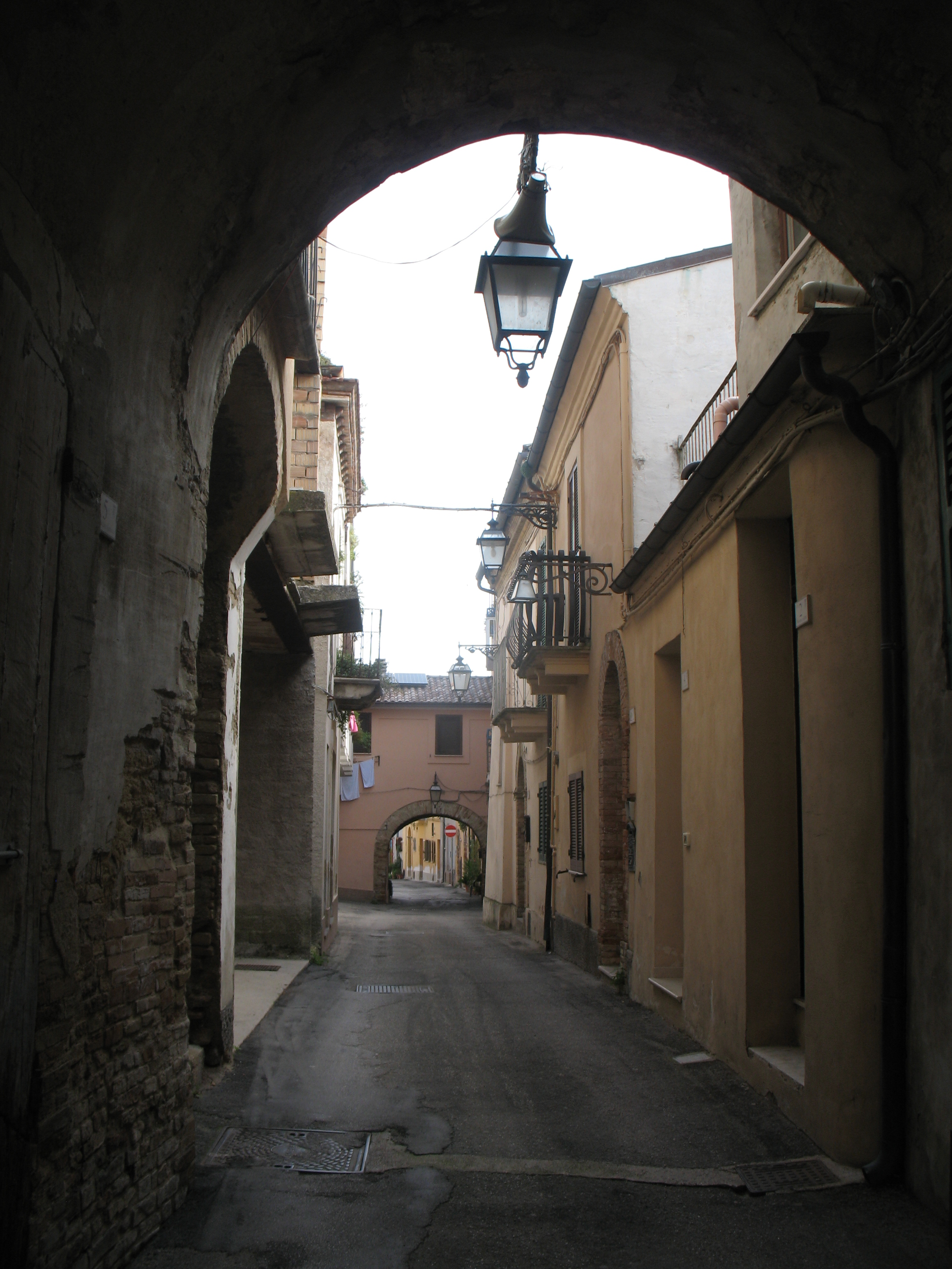 I cosiddetti sopportici sono una caratteristica di alcune strade del centro storico di Villamagna (CH)